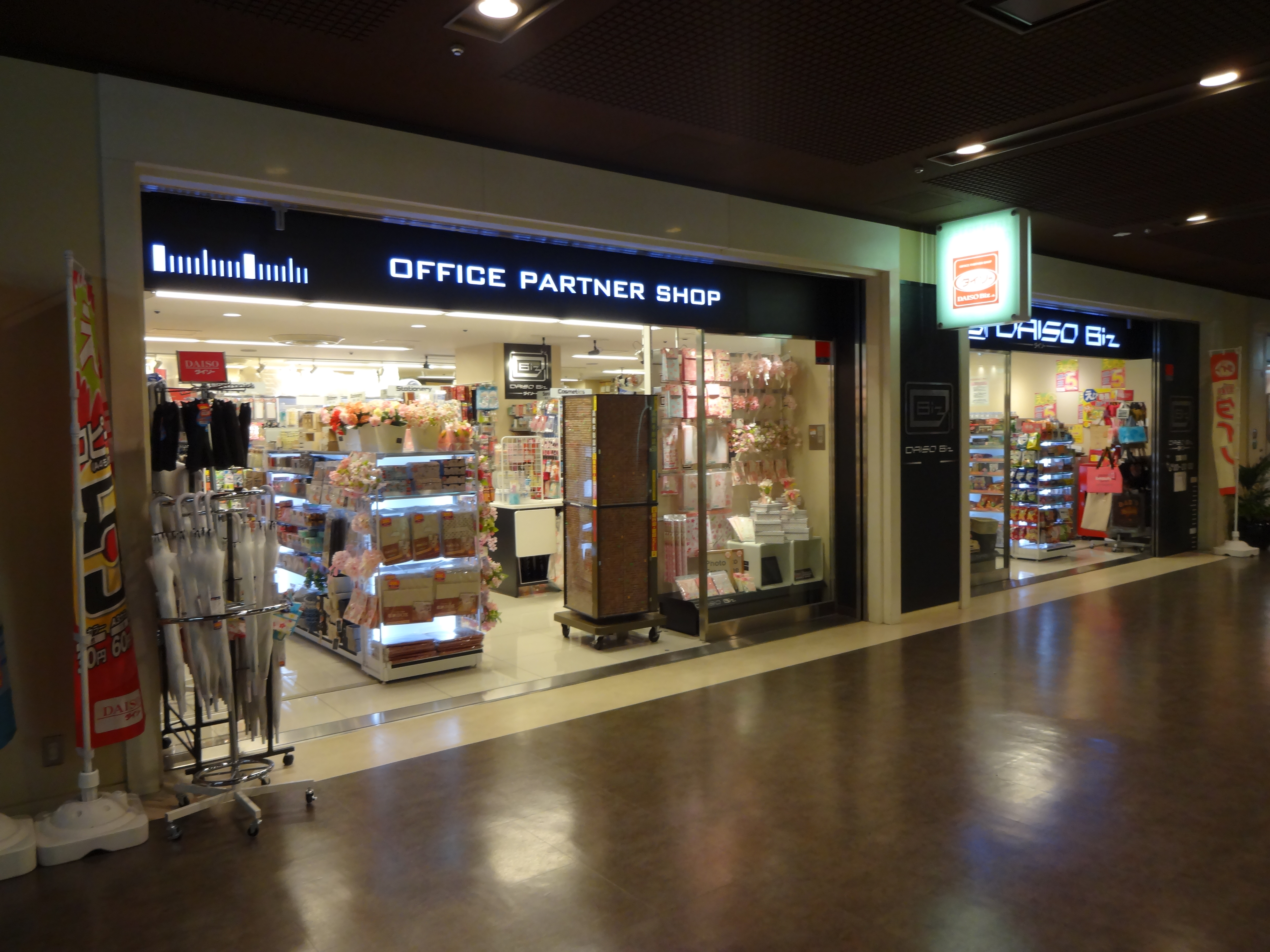 オフィスビルに入居するダイソー・ビズ（ビズ新宿野村ビル店）